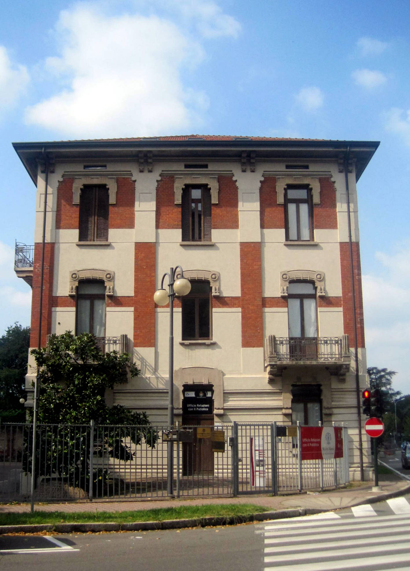 Molini Marzoli Massari This is a photo of a monument which is part of cultural heritage of Italy.